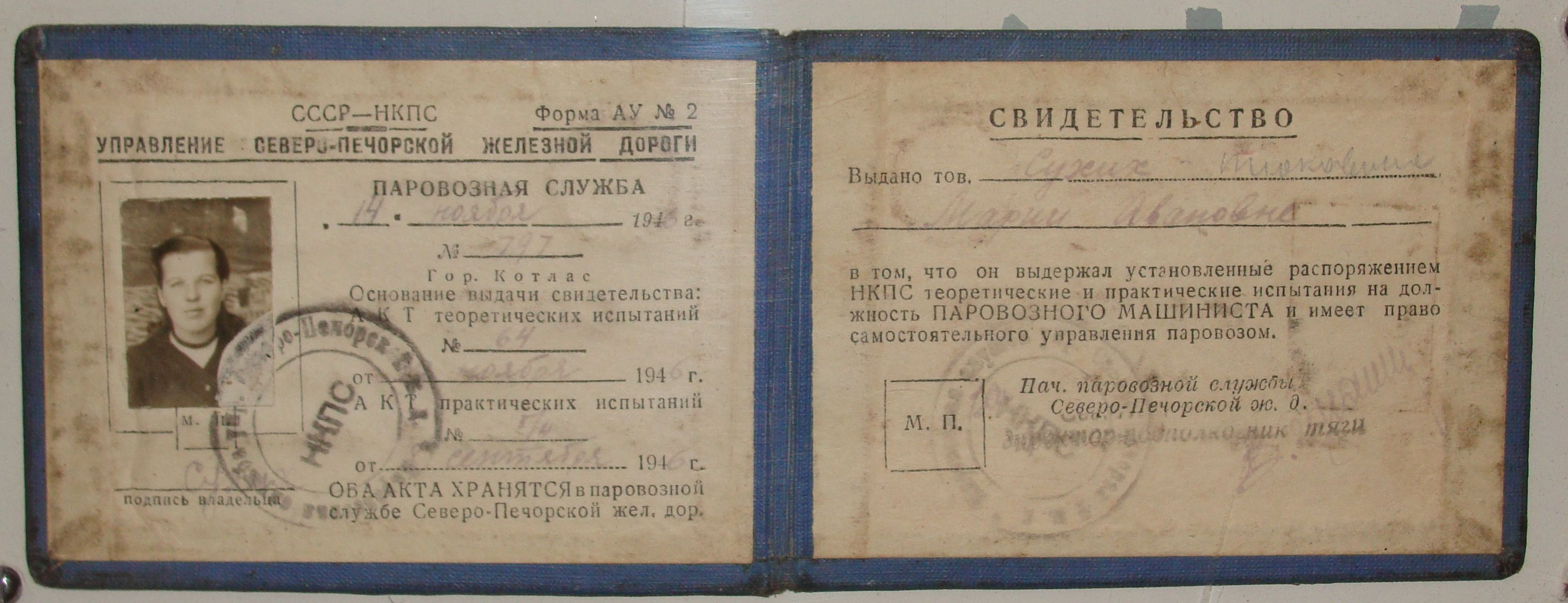 Котласский краеведческий музей